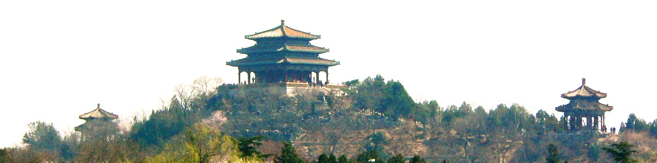 景山上的亭 拍摄